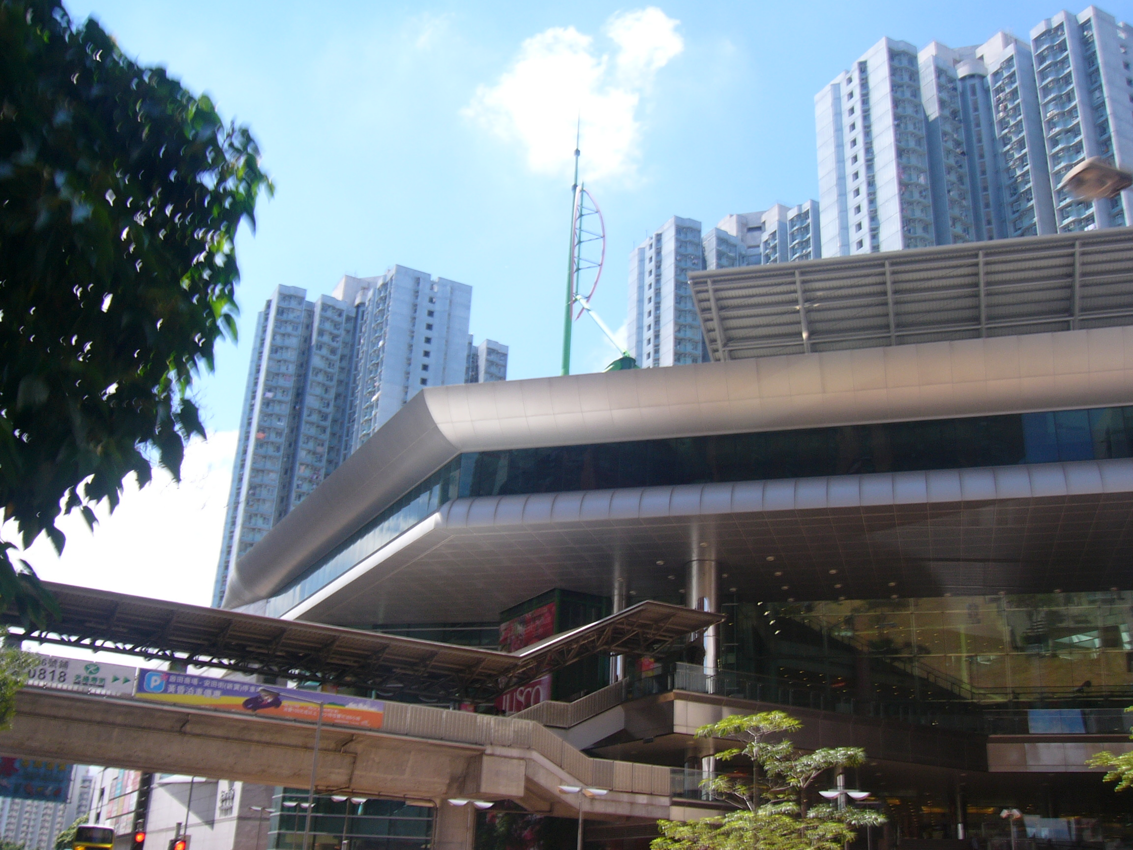 Kai Tin Estate and Kai Tin Mall